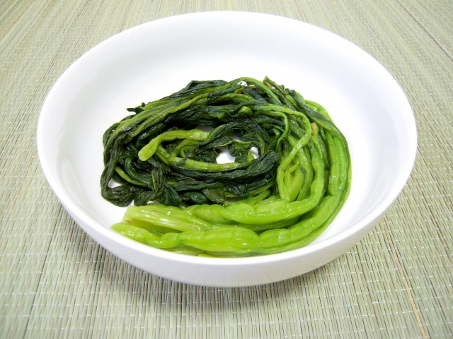 阿蘇の高菜漬け（切る前のもの）